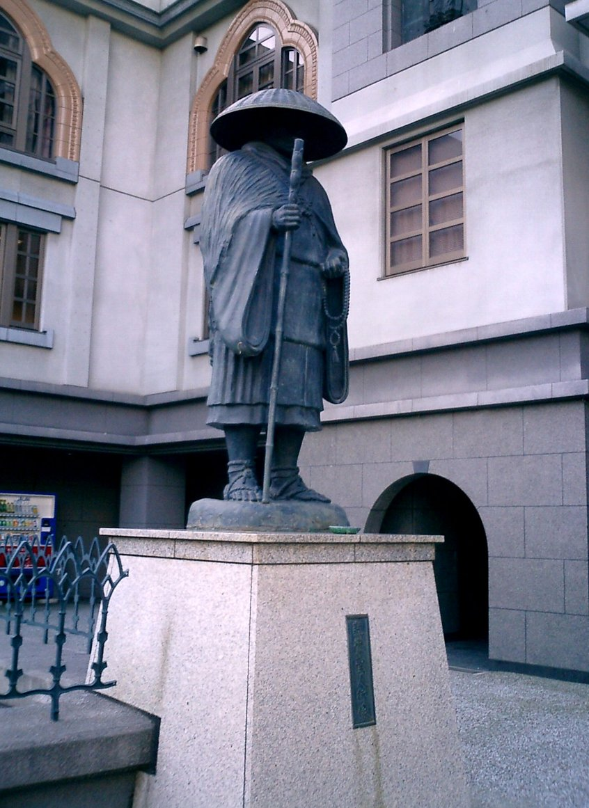 親鸞聖人御像 本願寺神戸別院にて